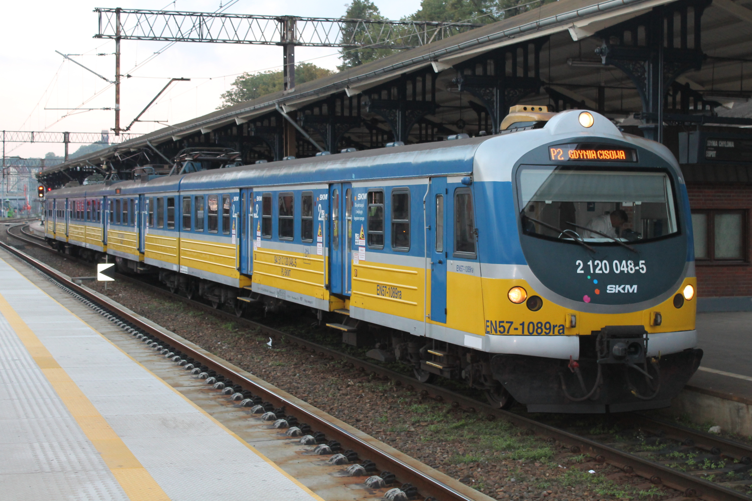 Zmodernizowany elektryczny zespół trakcyjny EN57-1089 stoi na stacji Gdańsk Główny. The making of this document was supported by Wikimedia Polska Association, within Wikigrant no. WG 2015-34.